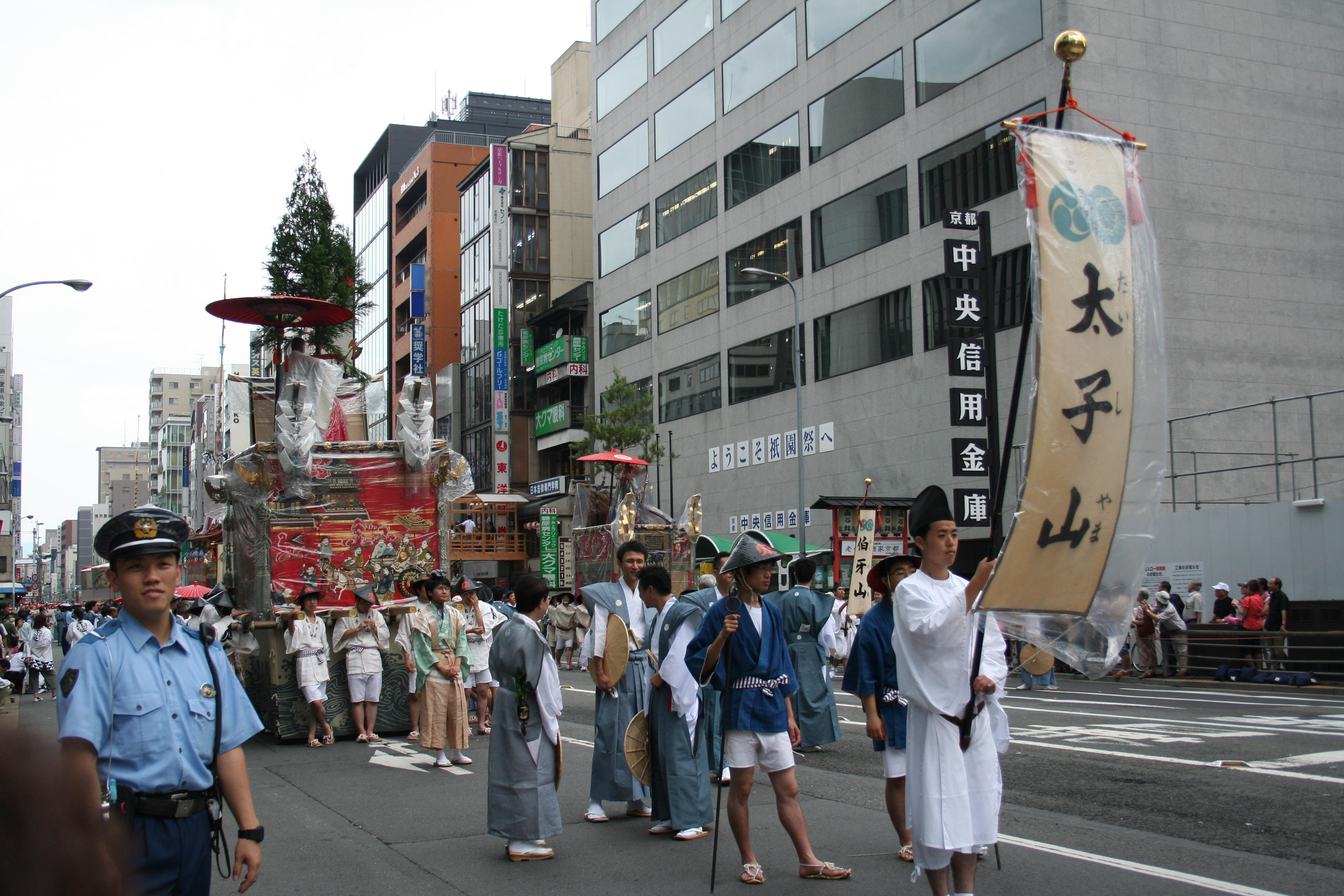 2009年7月17日に京都市で行なわれた祇園祭山鉾巡行の様子。 烏丸四条交差点西側にて行進の順番を待つ太子山の行列。